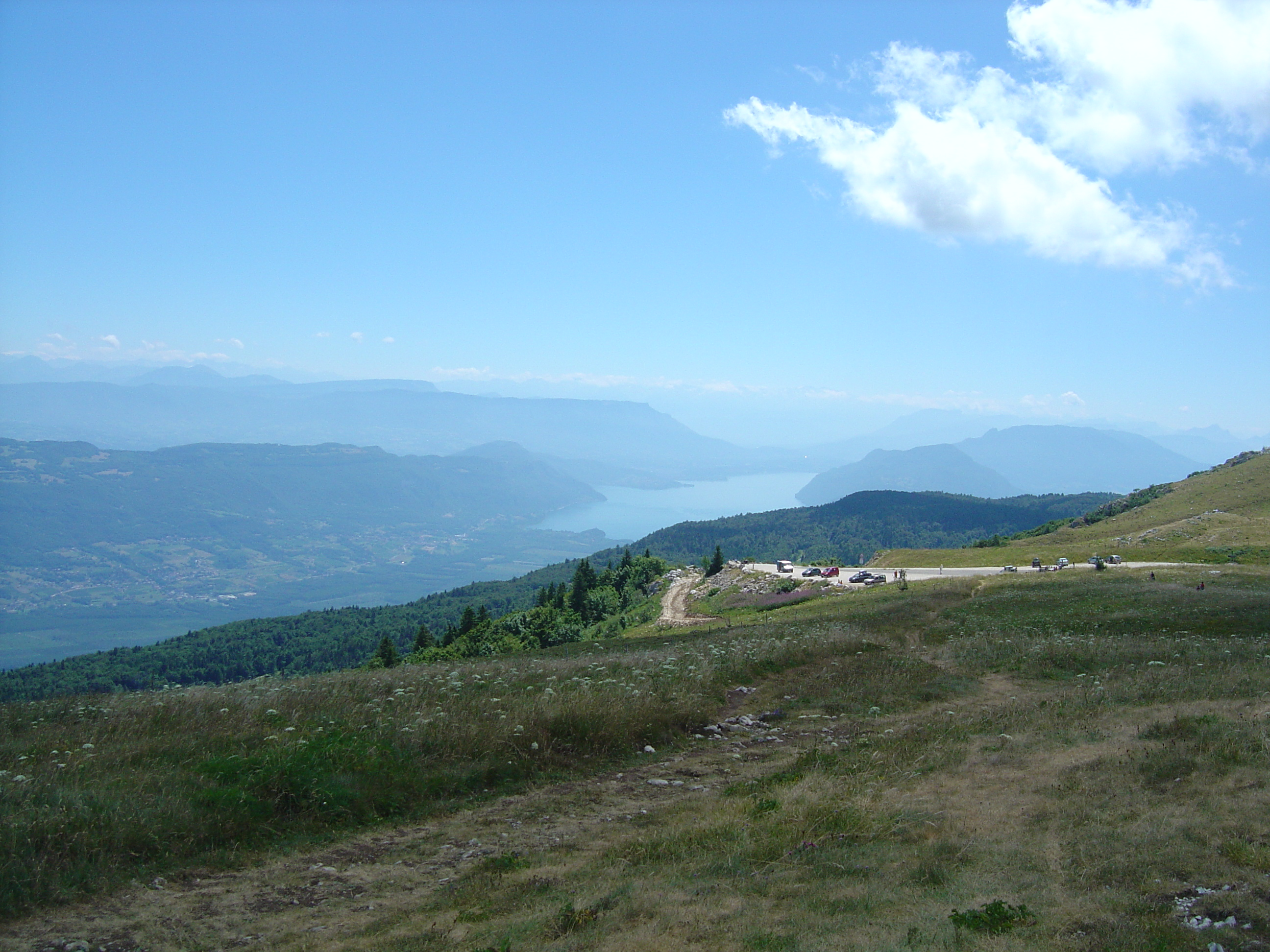 Le col du Grand Colombier (1505m) plus bas vu depuis la croix. On voit au fond le lac du Bourget